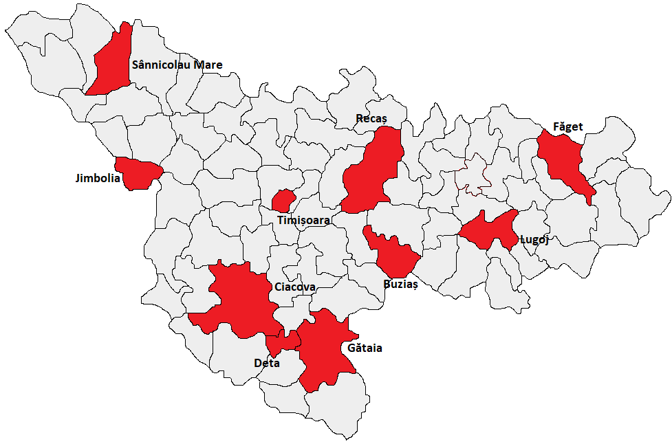 Categorie:Hărţi ale judeţului Timiş